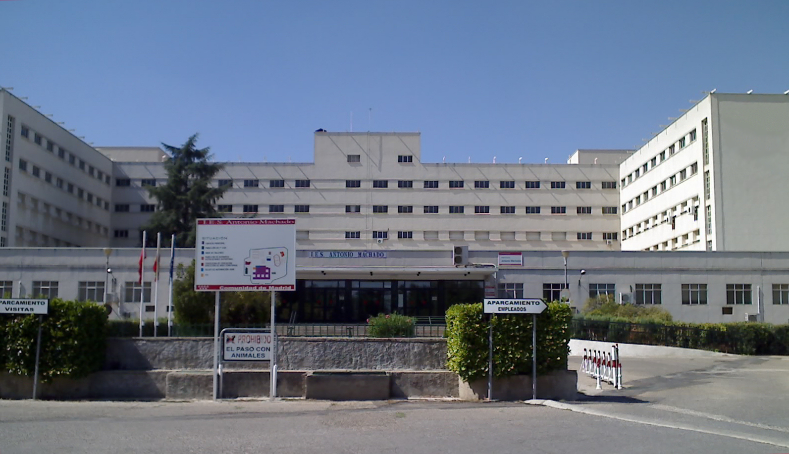 Aspecto actual (agosto 2011) de la Universidad Laboral de Alcalá de Henares (Comunidad de Madrid - España) construida y fundada en 1966. Actualmente se denomina "Instituto de Enseñanza Secundaria Antonio Machado" (IES Antonio Machado).